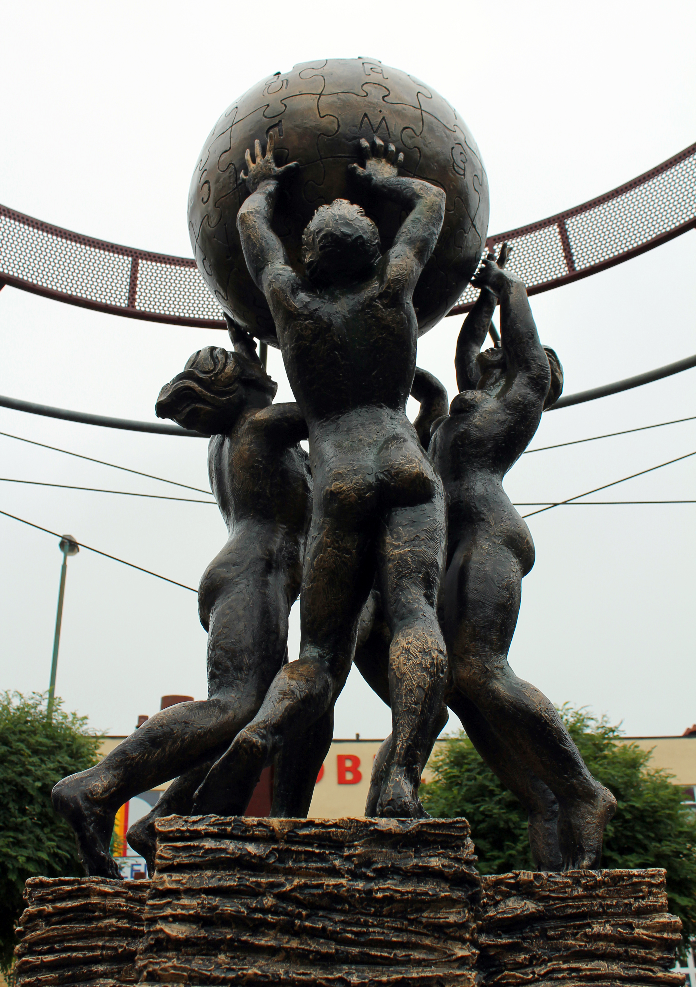 Pomnik Wikipedii